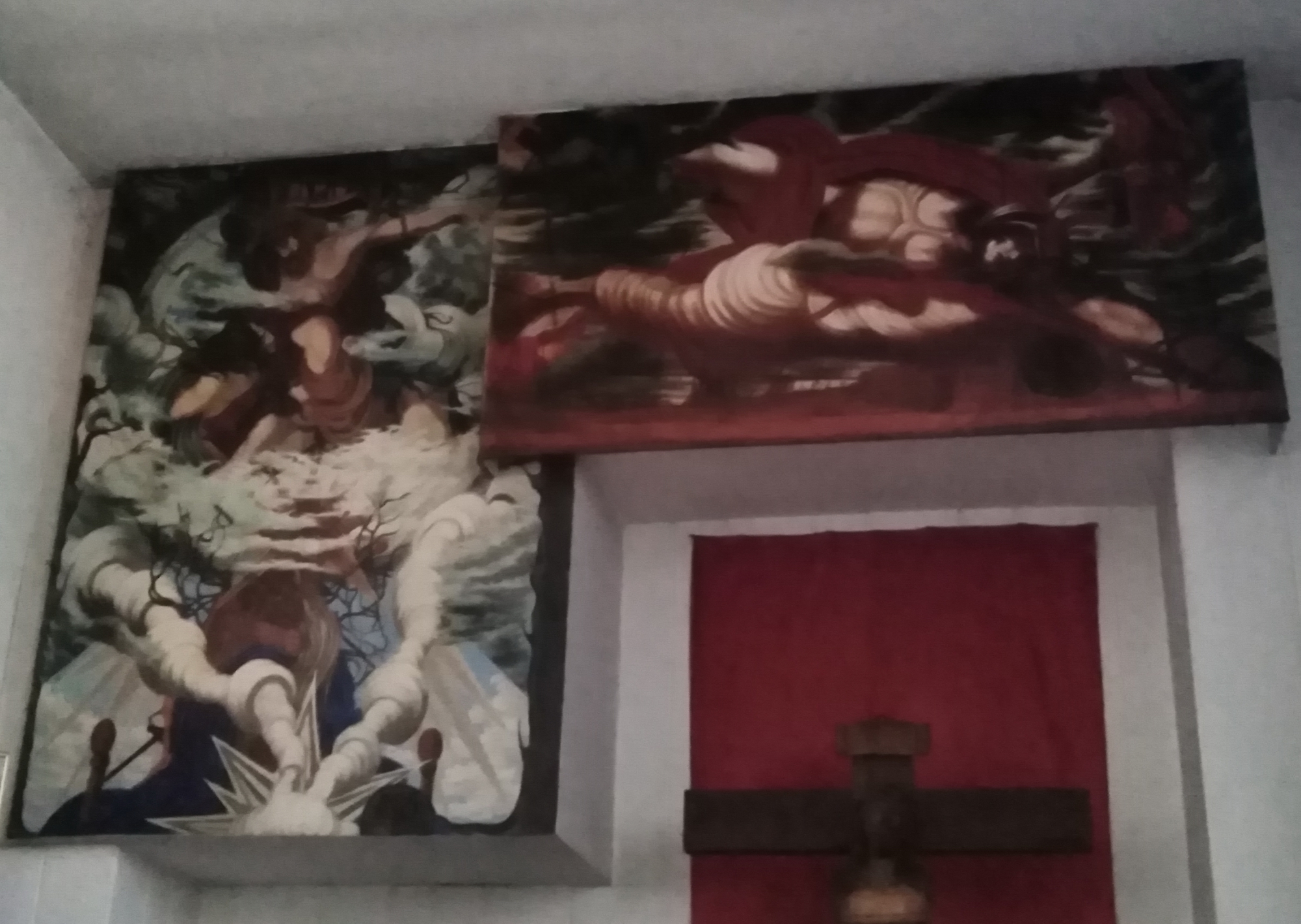 Opera del pittore Pasquale Russo Maresca